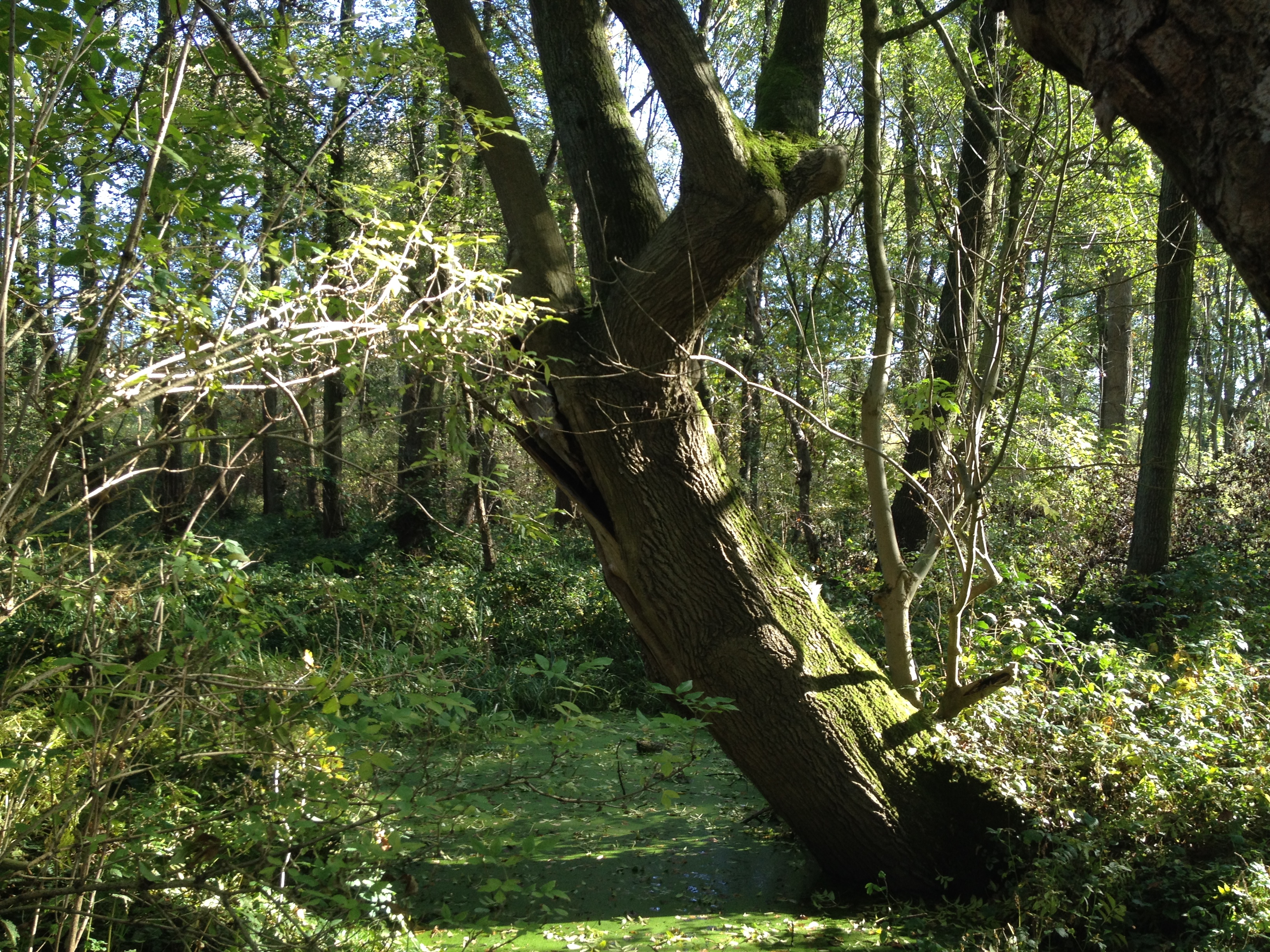 Tuedderner Venn